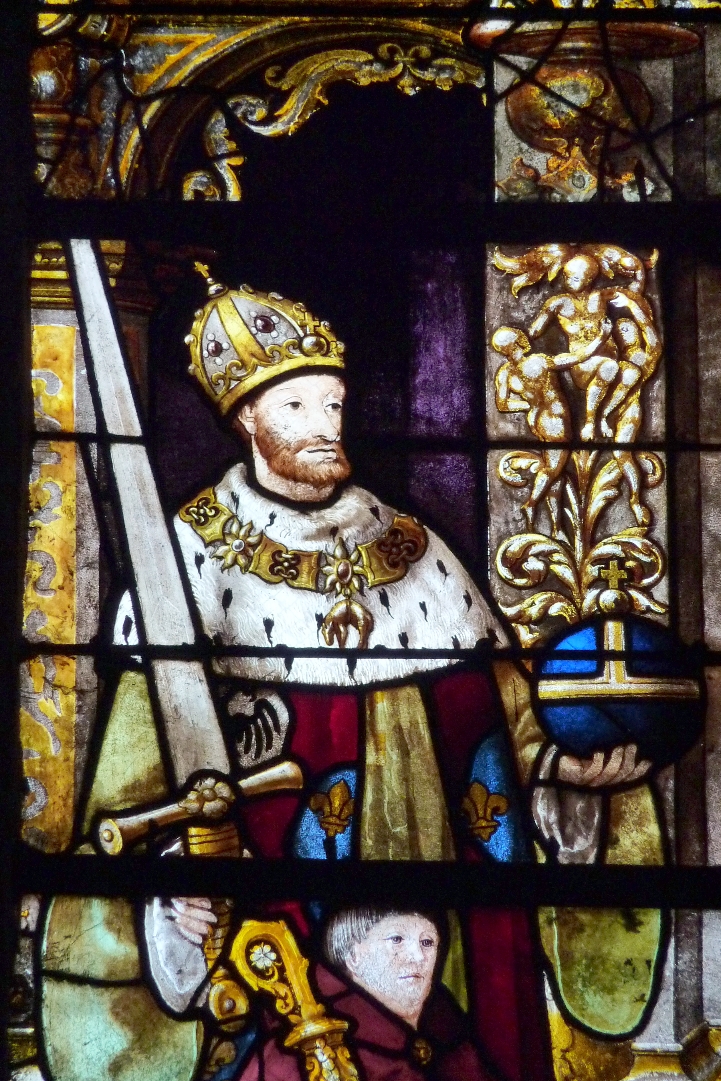 Ausschnitt des Bleiglasfensters Nr. 7 (16. Jahrhundert) in der katholischen Pfarrkirche Saint-Martin (Collégiale Saint-Martin) in Montmorency, mit Signatur E.L.P. (Engrand Leprince), Darstellung: Karl der Große und Charles de Villiers de l'Isle-Adam (knieend, Bischof von Limoges und Beauvais) (siehe: Dominique Foussard, Charles Huet, Mathieu Lours: Églises du Val-d'Oise. Pays de France, Vallée de Montmorency. Société d'Histoire et d'Archéologie de Gonesse et du Pays de France, 2. Auflage, Gonesse 2011, ISBN 9782953155426)